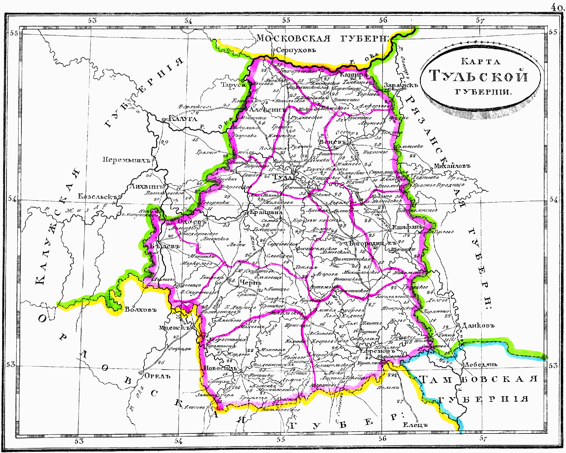 Карта Тульской губернии, 1835